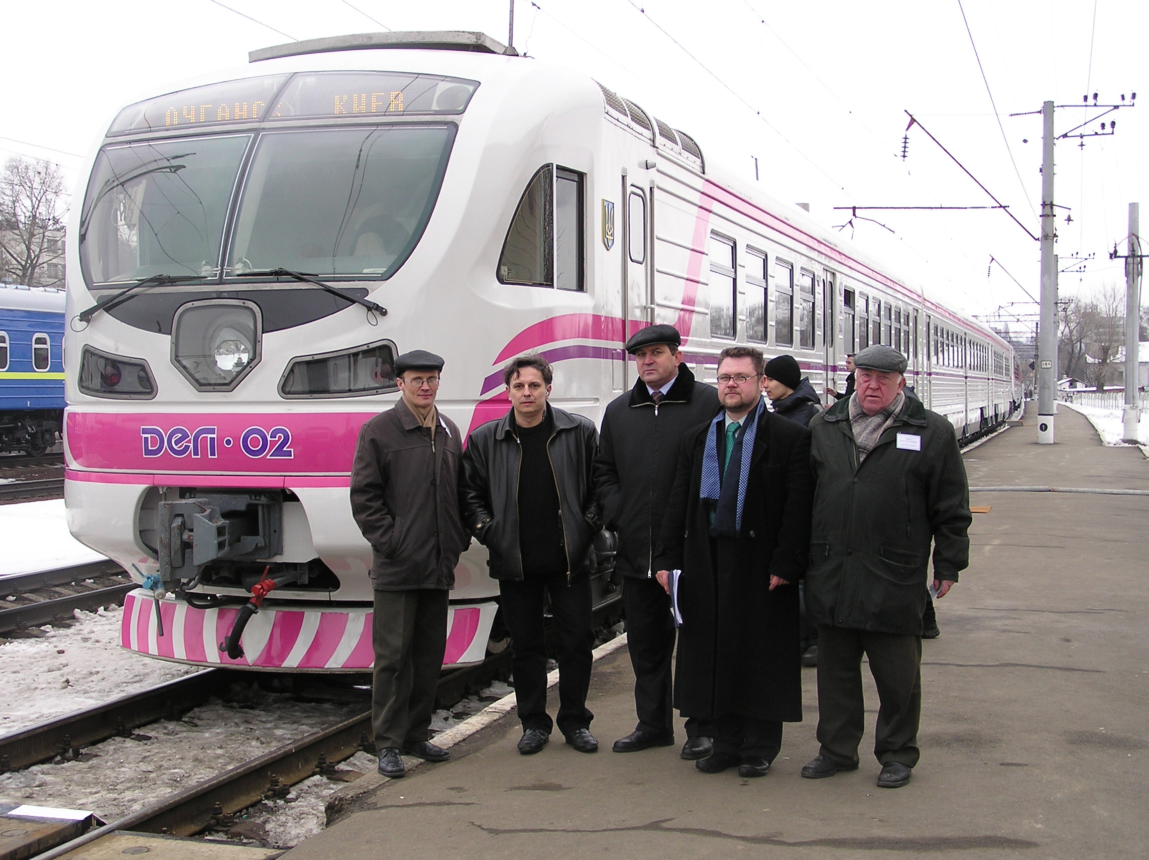 ДЭЛ 02